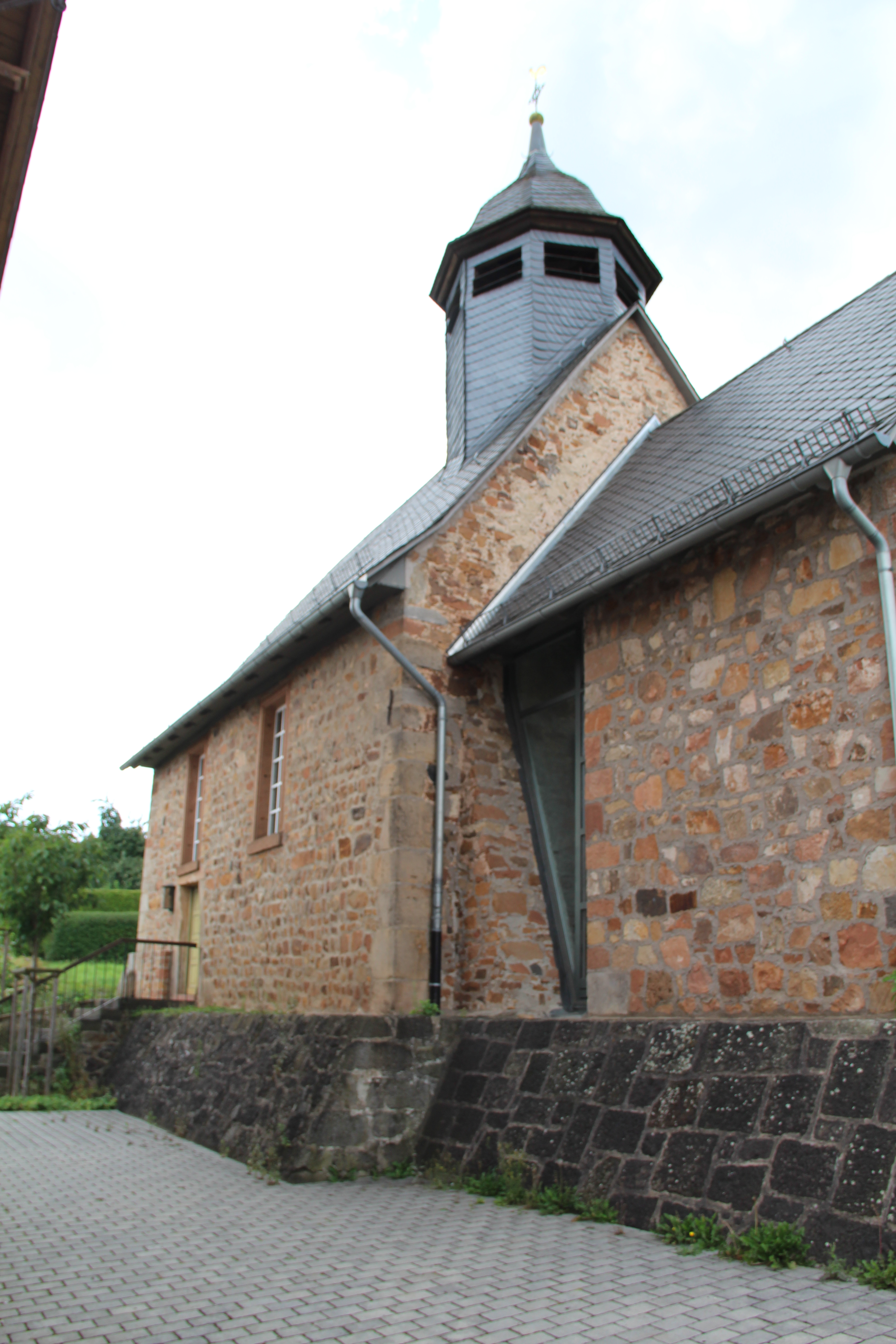 Kirche